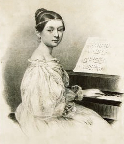 Clara Wieck im Alter von 15 Jahren. Vor Clara aufgeschlagen ist der Solopart mit dem Beginn des 3. Satzes aus ihrem Klavierkonzert a-moll op. 7.